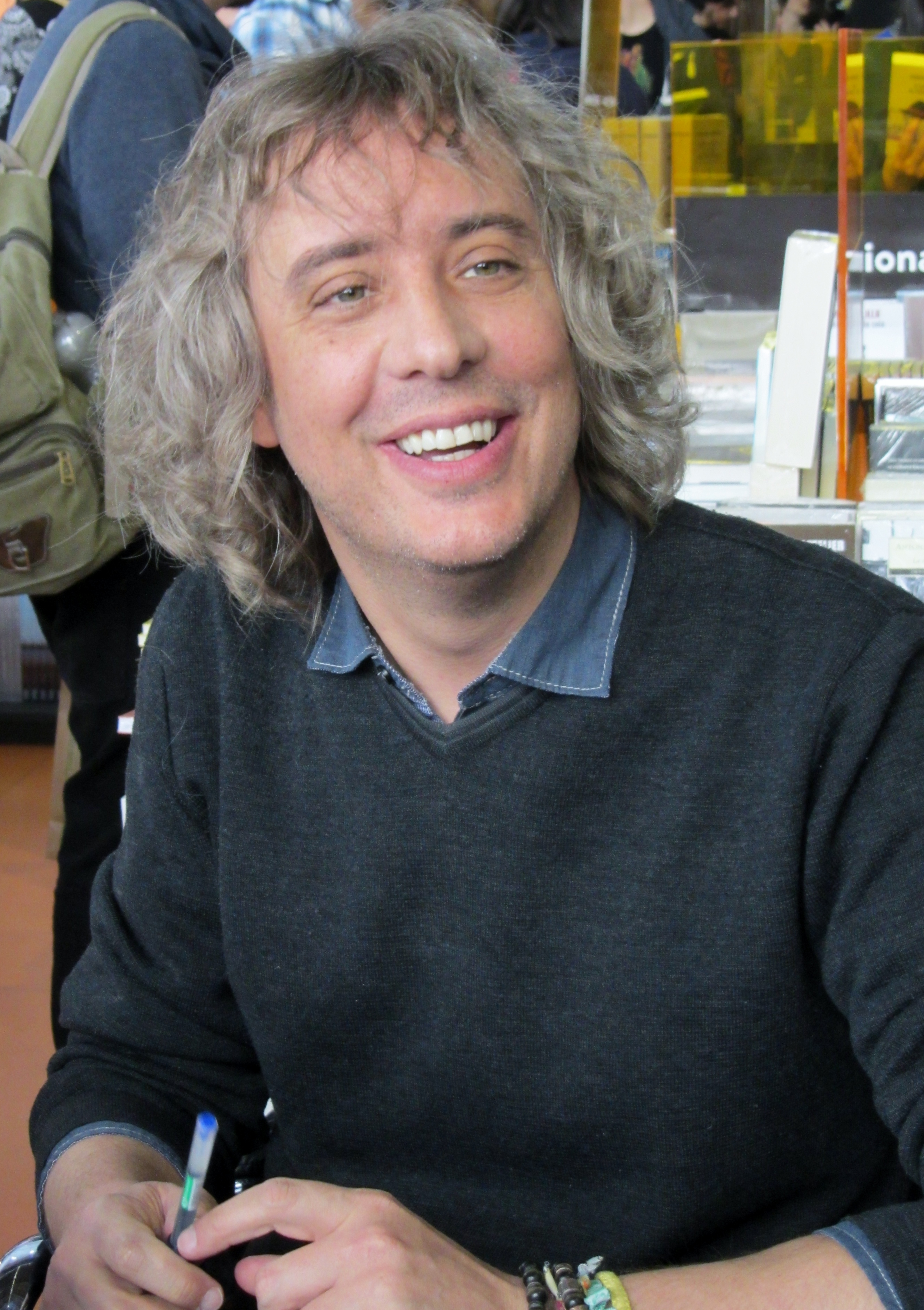 El escritor chileno José Ignacio Valenzuela en la Feria Internacional del Libro de Santiago 2015